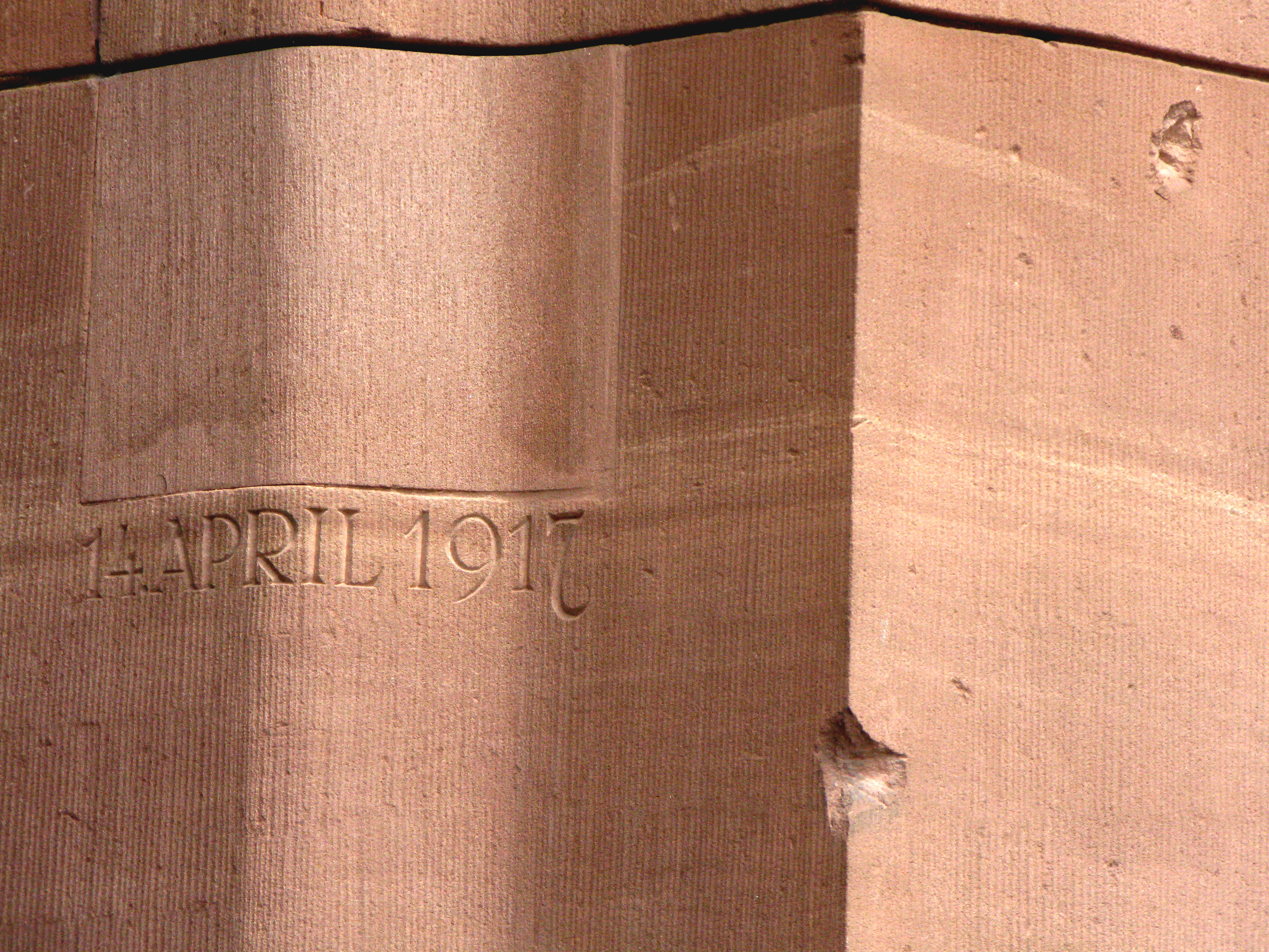 Einschusslöcher aus dem 1. Weltkrieg am Kollegiengebäude I der Uni Freiburg